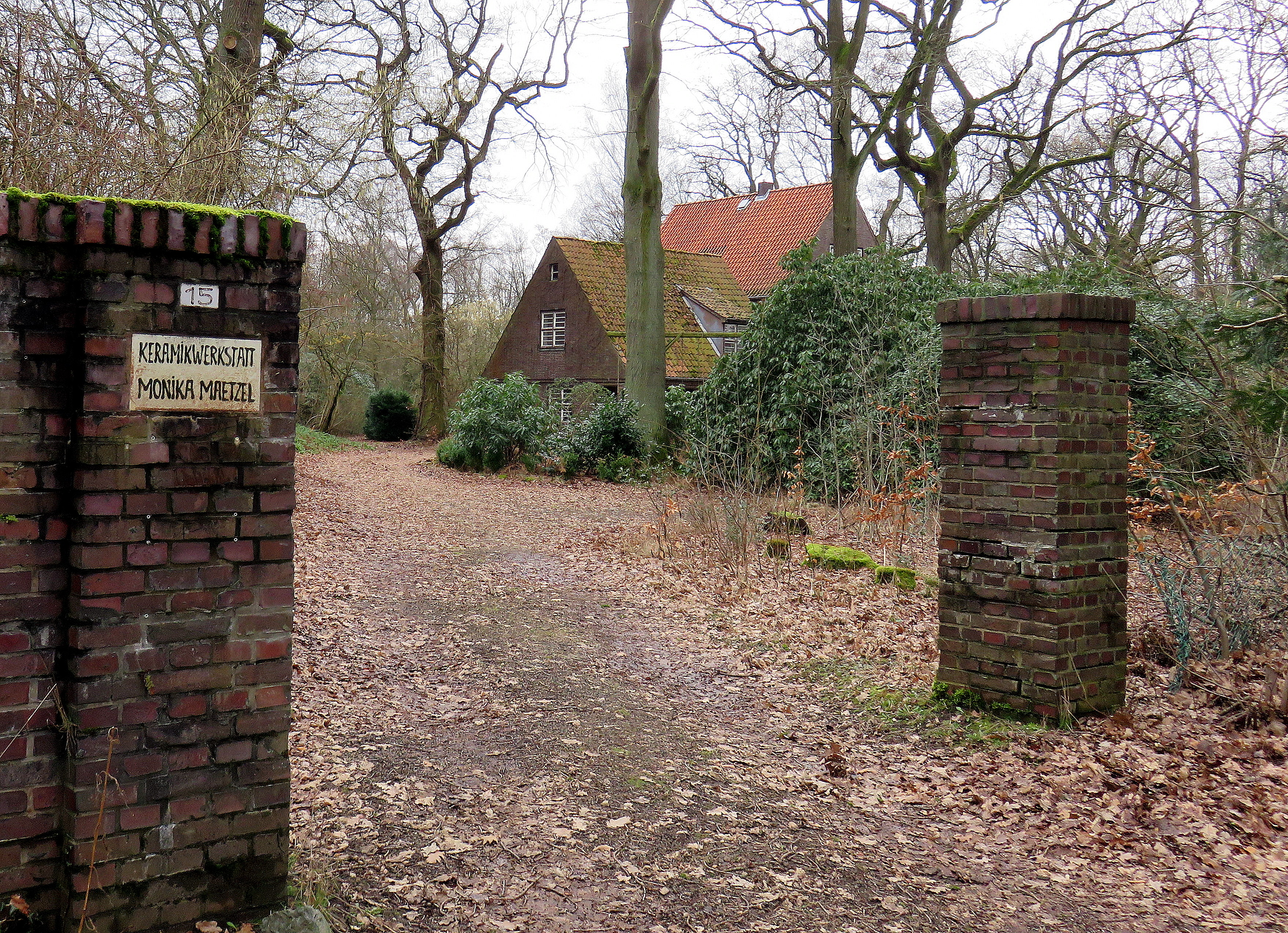 Grundstück mit Wohnhaus, Ateliers und Werkstätten der deutschen Künstlerfamilie Emil Maetzel, seiner Ehefrau Dorothea Maetzel-Johannsen und Tochter Monika Maetzel, entstanden 1921-1925. Situation März 2017. This is a photograph of an architectural monument.